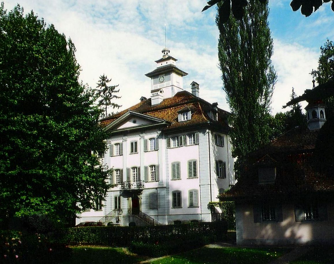 Der Himmelrich Herrensitz im Obergrund bei Luzern